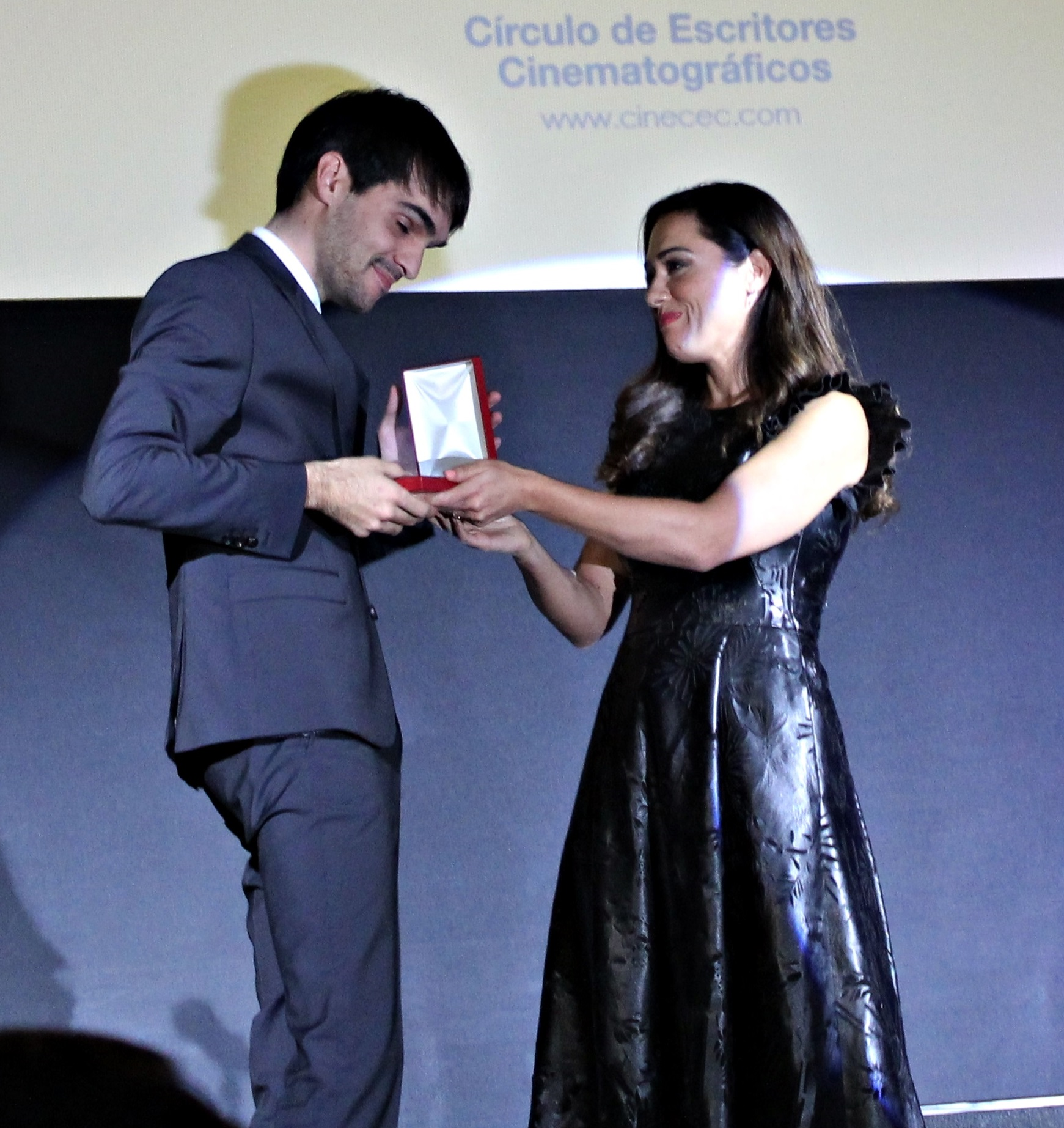 Eneko Sagardoy recibe la medalla del Círculo de Escritores Cinematográficos al mejor actor revelación en la edición de 2017 por su trabajo en la película Handia.